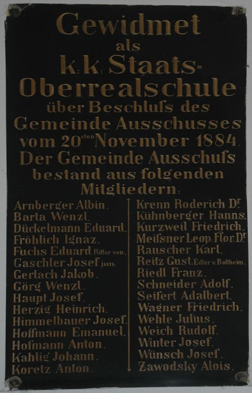 Gedenktafel zur Gründung der Oberrealschule Währing im Schopenhauer Realgymnasium